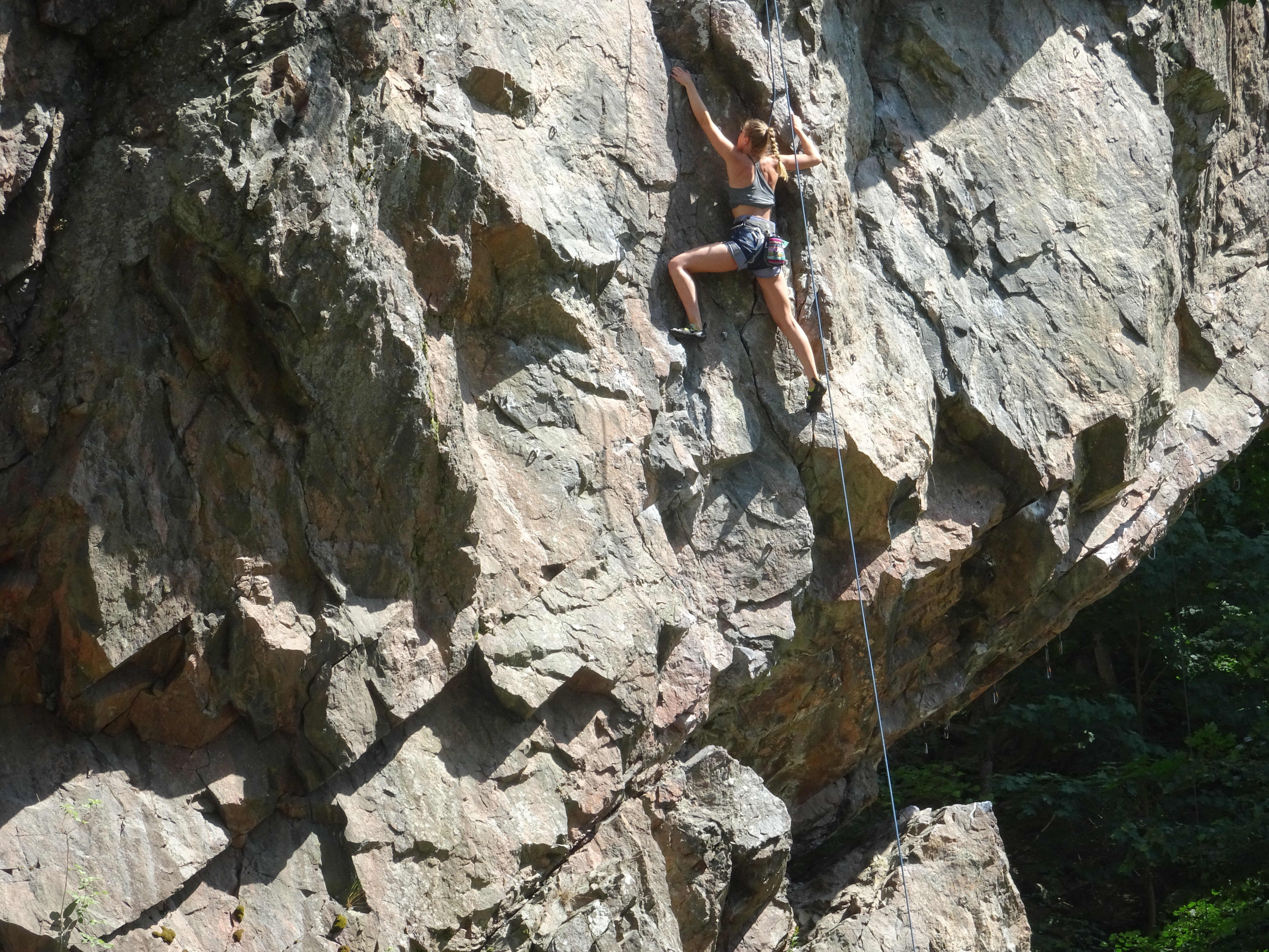 Klätterberget (Örnberget) Tullinge